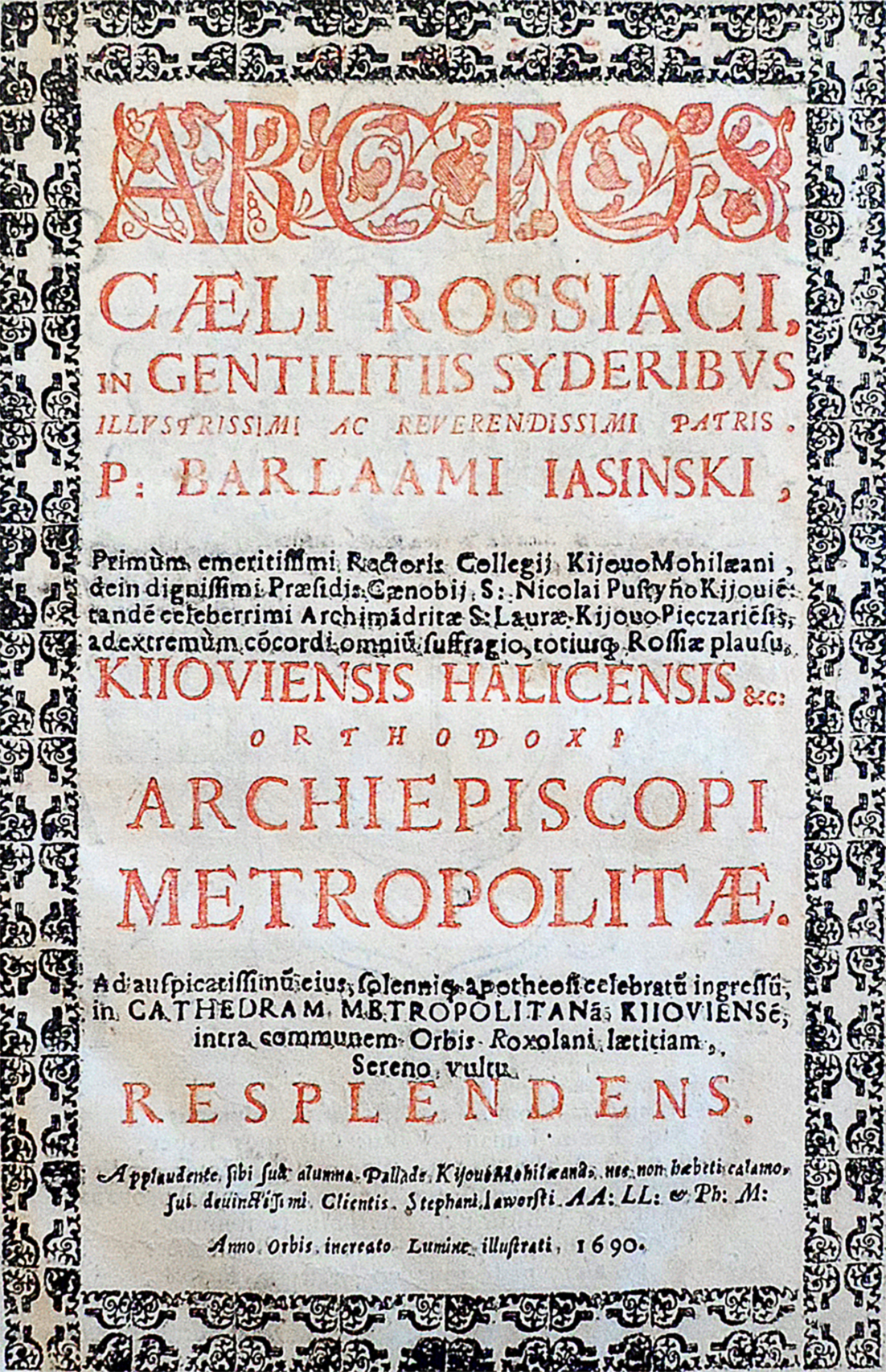 Стефан Яворський. "Арктос неба руського у родових зорях ясновельможного і вельмишановного отця Варлаама Ясинського... відблискуючий..." (Титульний аркуш).